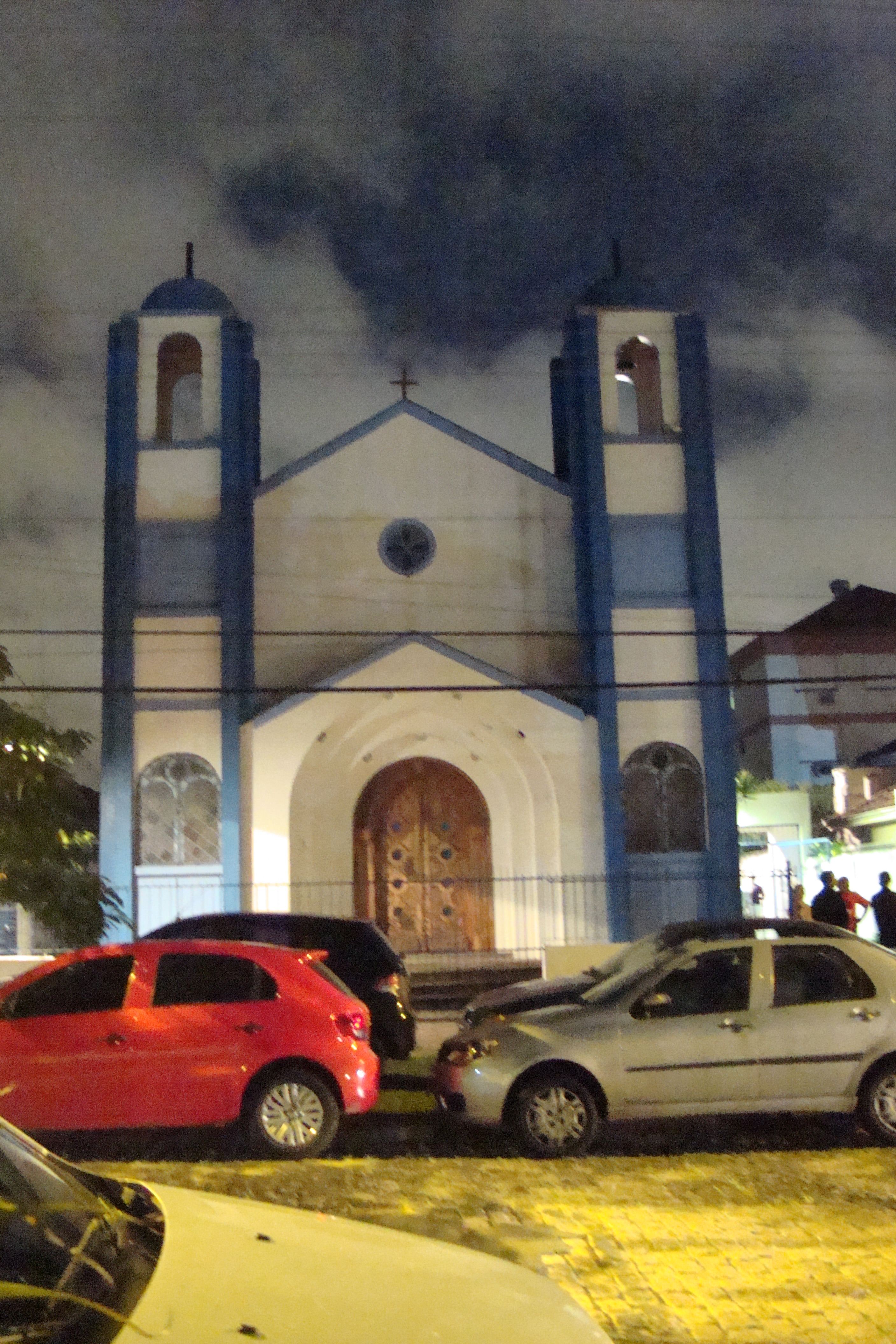 Igreja Ortodoxa Grega dos Santos Apóstolos em Porto Alegre